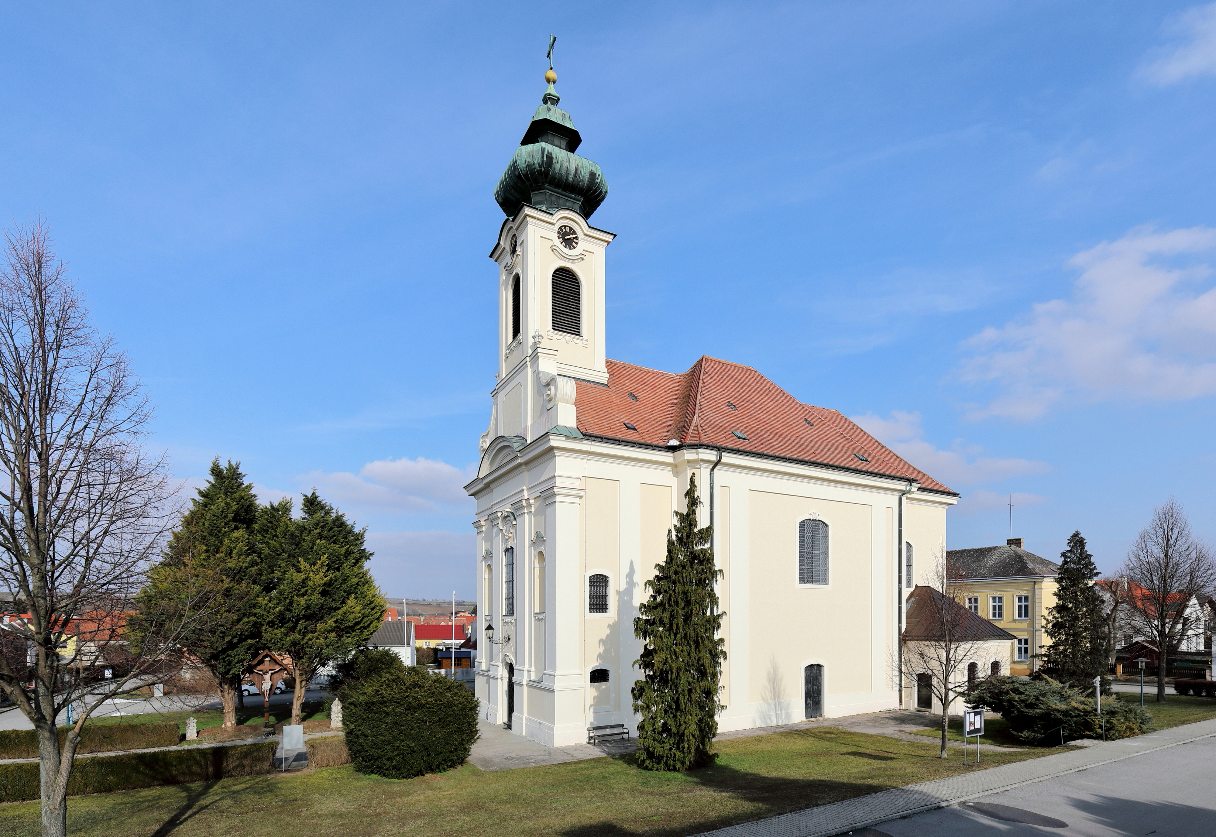 Südwestansicht der röm.-kath. Pfarrkirche hl. Leonhard in Ollersdorf, ein Ortsteil der niederösterreichischen Marktgemeinde Angern an der March. Ein einheitlicher Barockbau mit Westturmfassade, der von 1742 bis 1746 errichtet wurde.